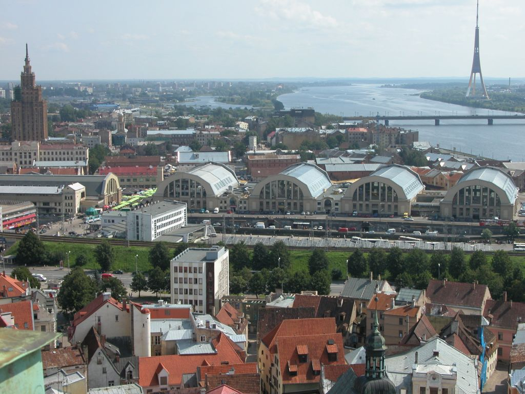 Riga, Lettland, Markthallen (Totale)